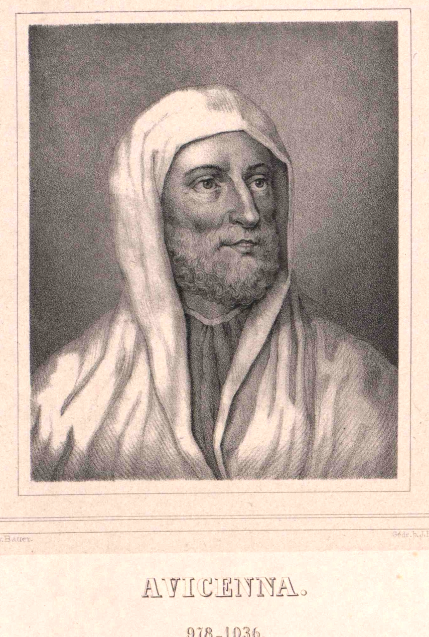 Avicenna (980 - 1037) Arzt, Gelehrter, Medizin, Porträt